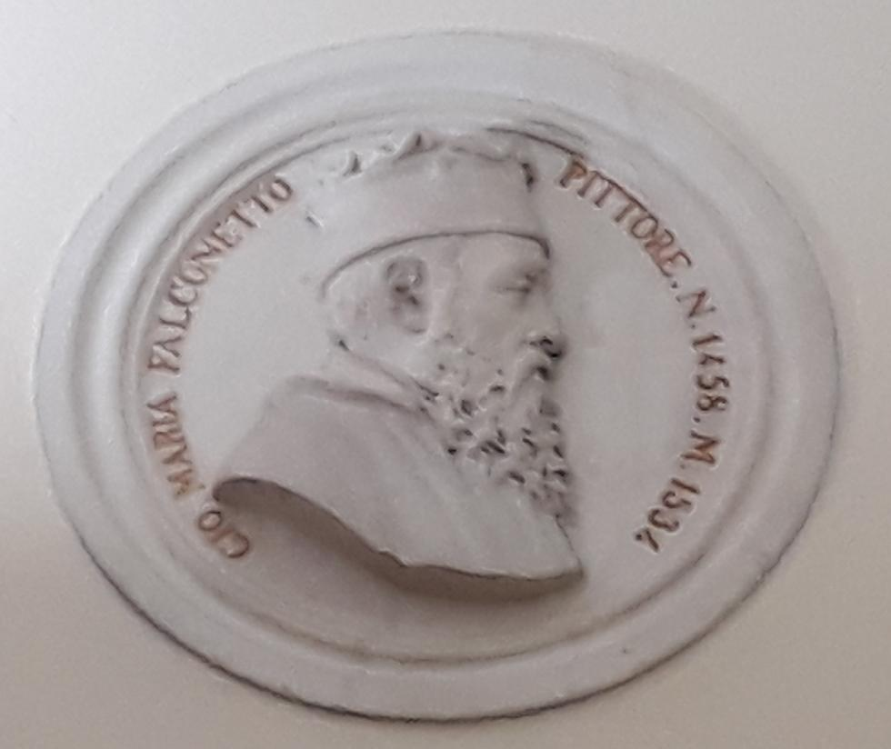 Effige di Giovanni Maria Falconetto